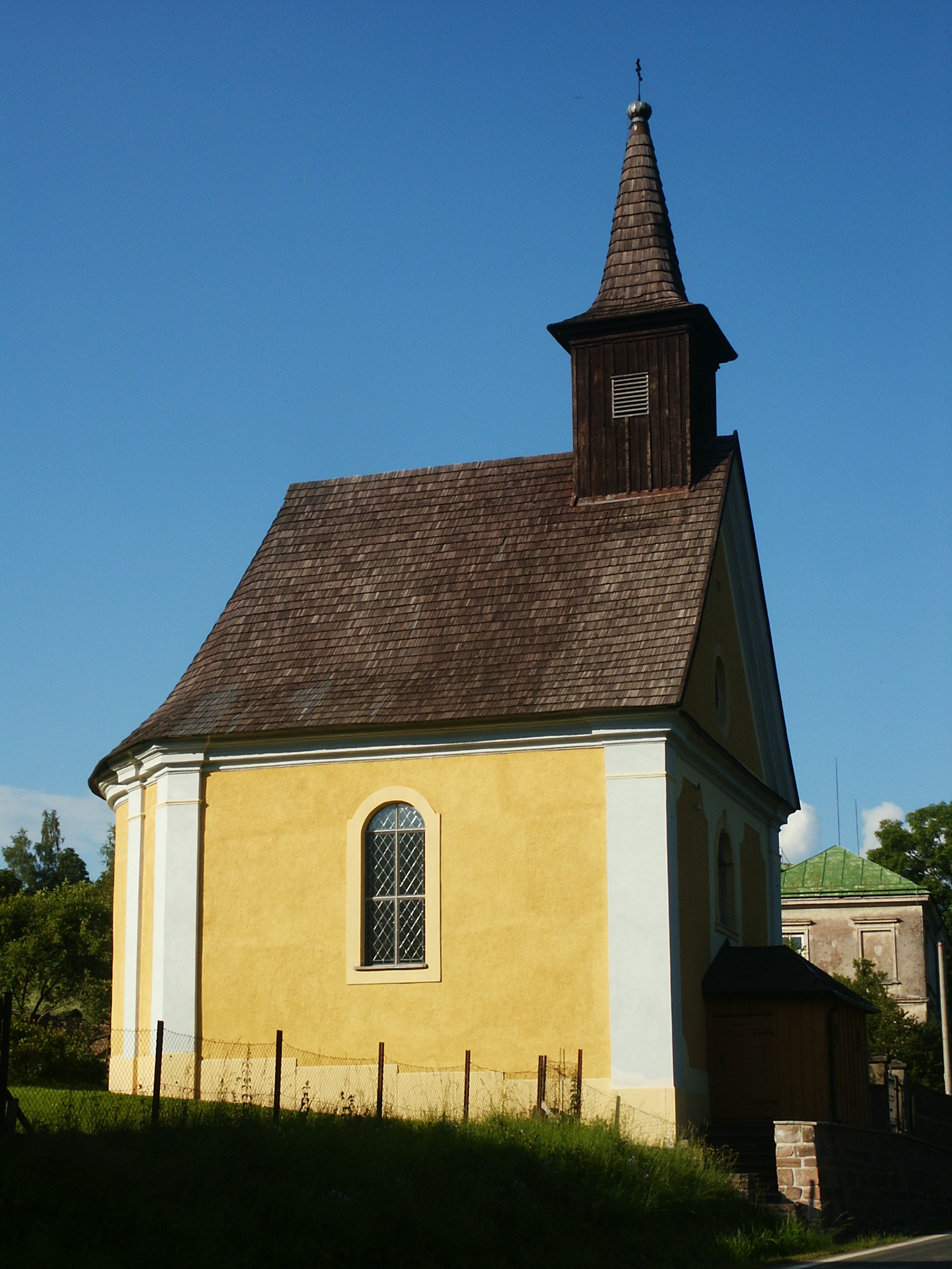 Kaple sv. Tekly, při silnici na Žacléř, Babí (Trutnov).